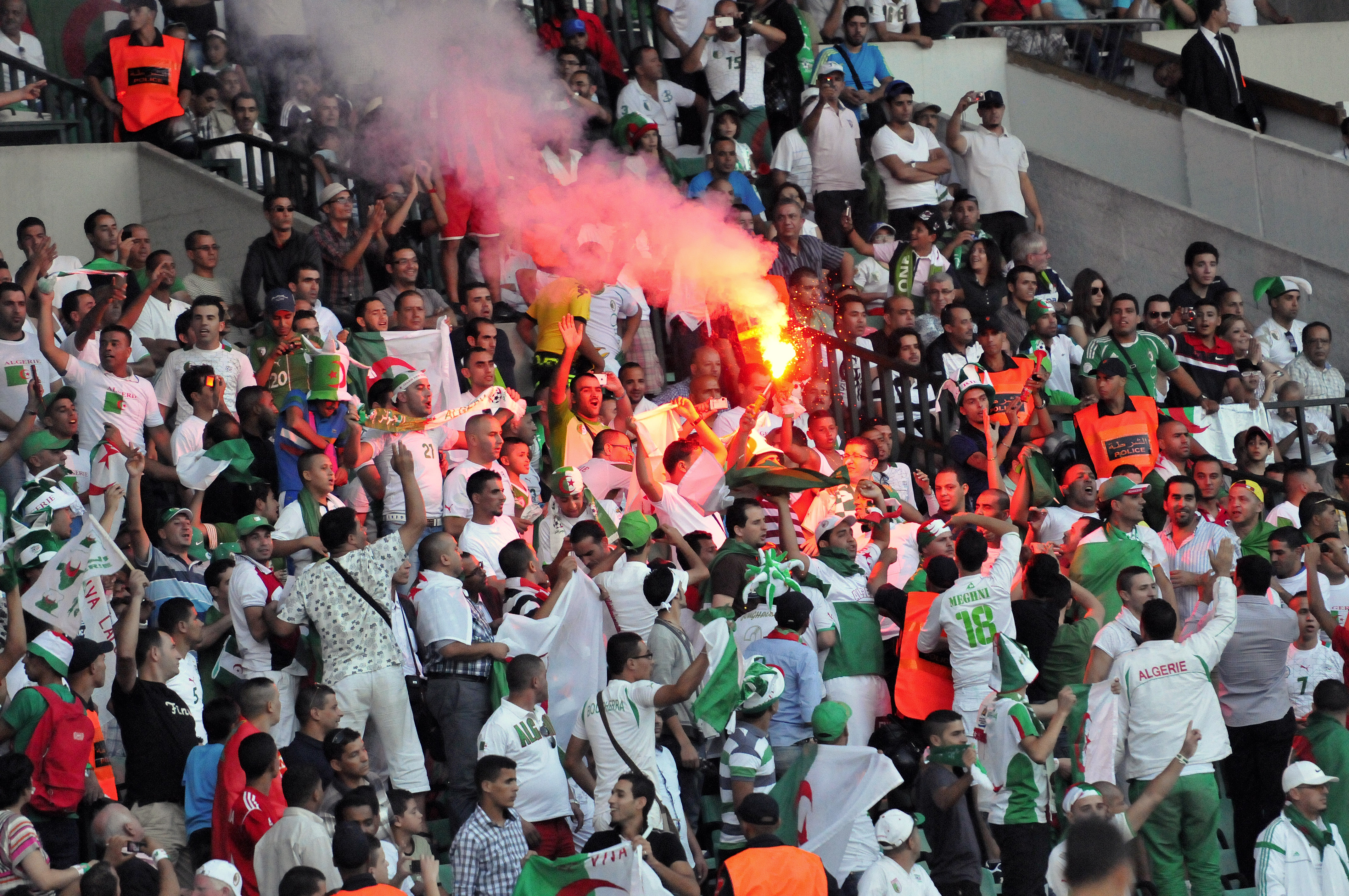 Supporters algériens lors du match Libye-Algérie au Maroc.